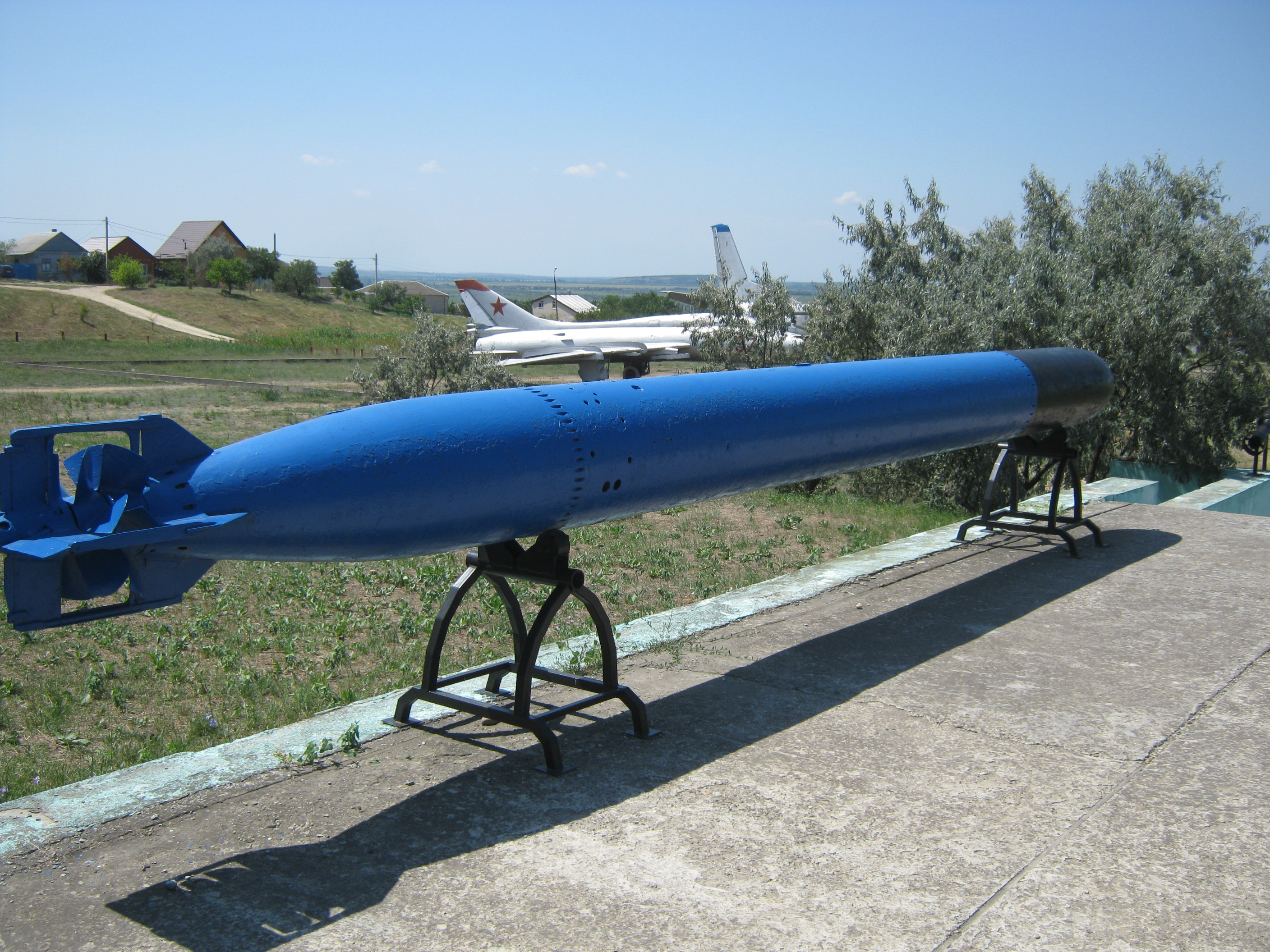 Военная горка (Темрюк)